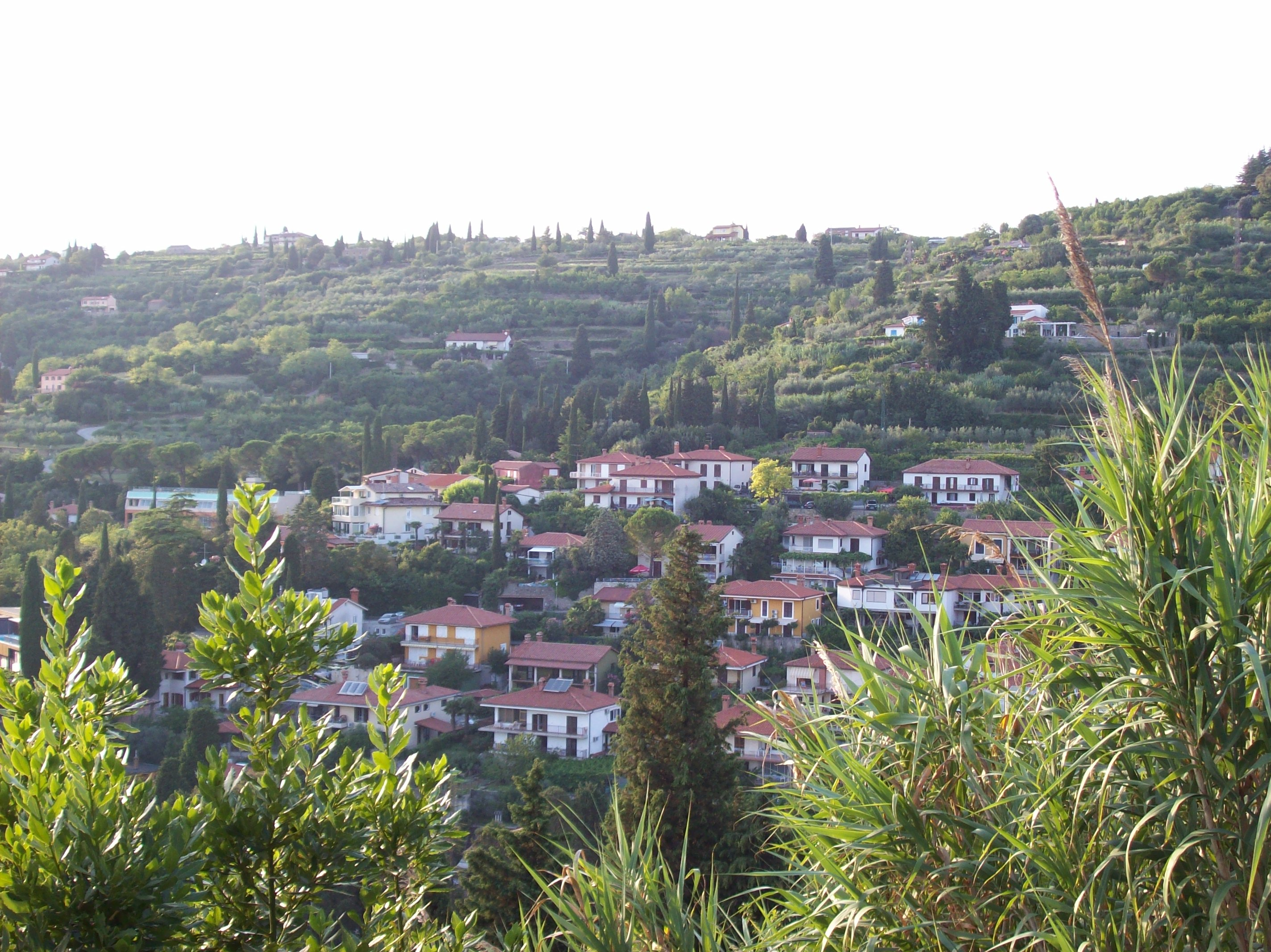 Portorož (Slovenija)